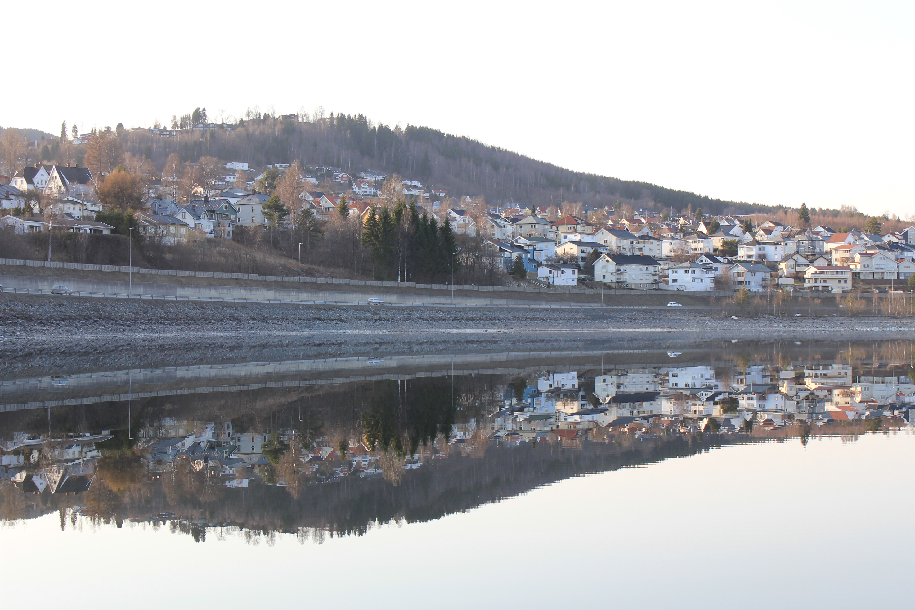 Nordbyen på Gjøvik. Nordbyen er den delen av Gjøvik som ligger nord for Hunnselva. Bydelen ligger i sin helhet bak RV. 4. Bildet er tatt mot Engelandsvika.